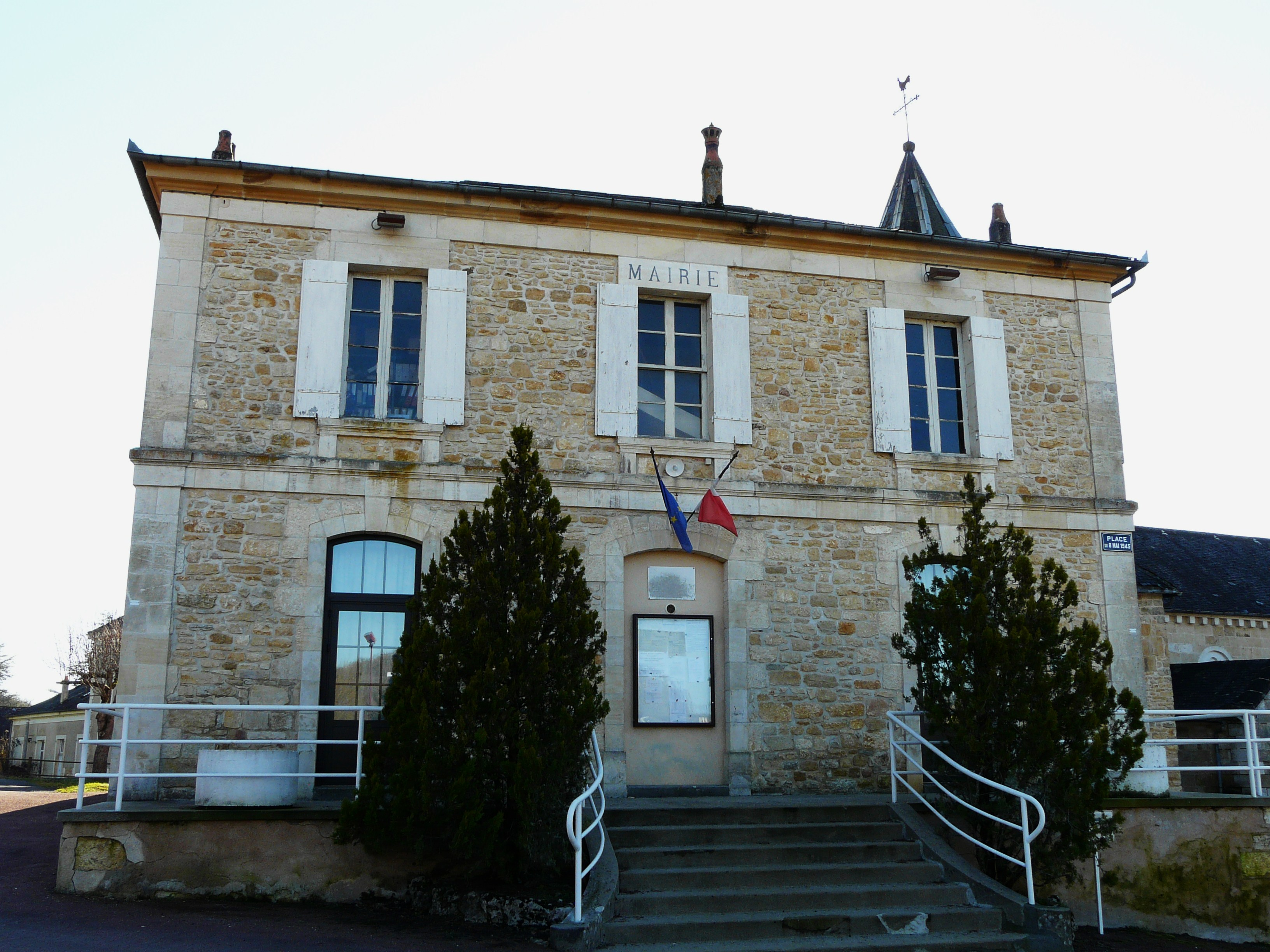 La mairie de Saint-Germain-des-Prés, Dordogne, France.